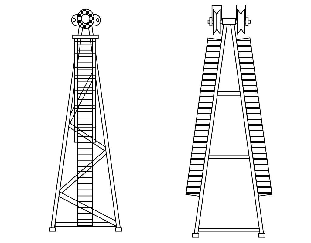 Оголовок КБ-573